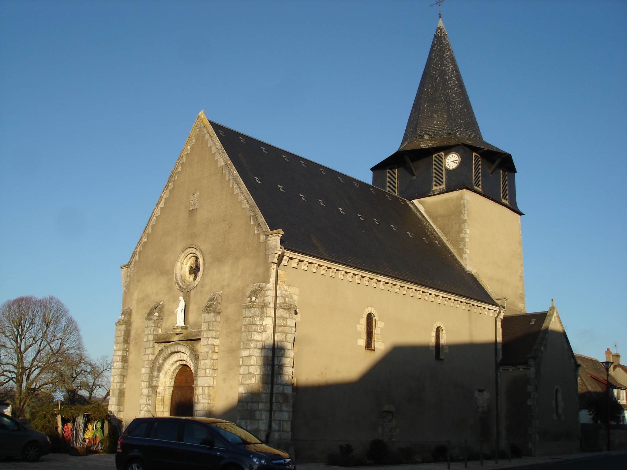 Thevet-Saint-Julien (36) : L'église Saint-Julien.